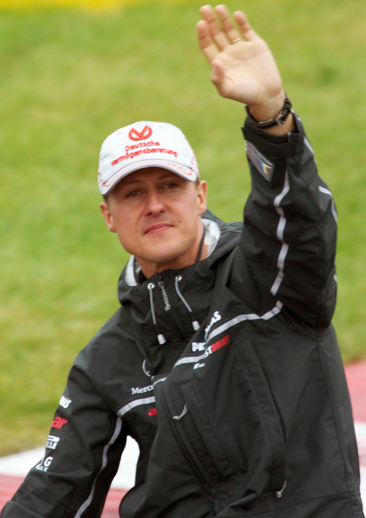 Michael Schumacher dalam parade pembalap jelang GP Kanada 2011